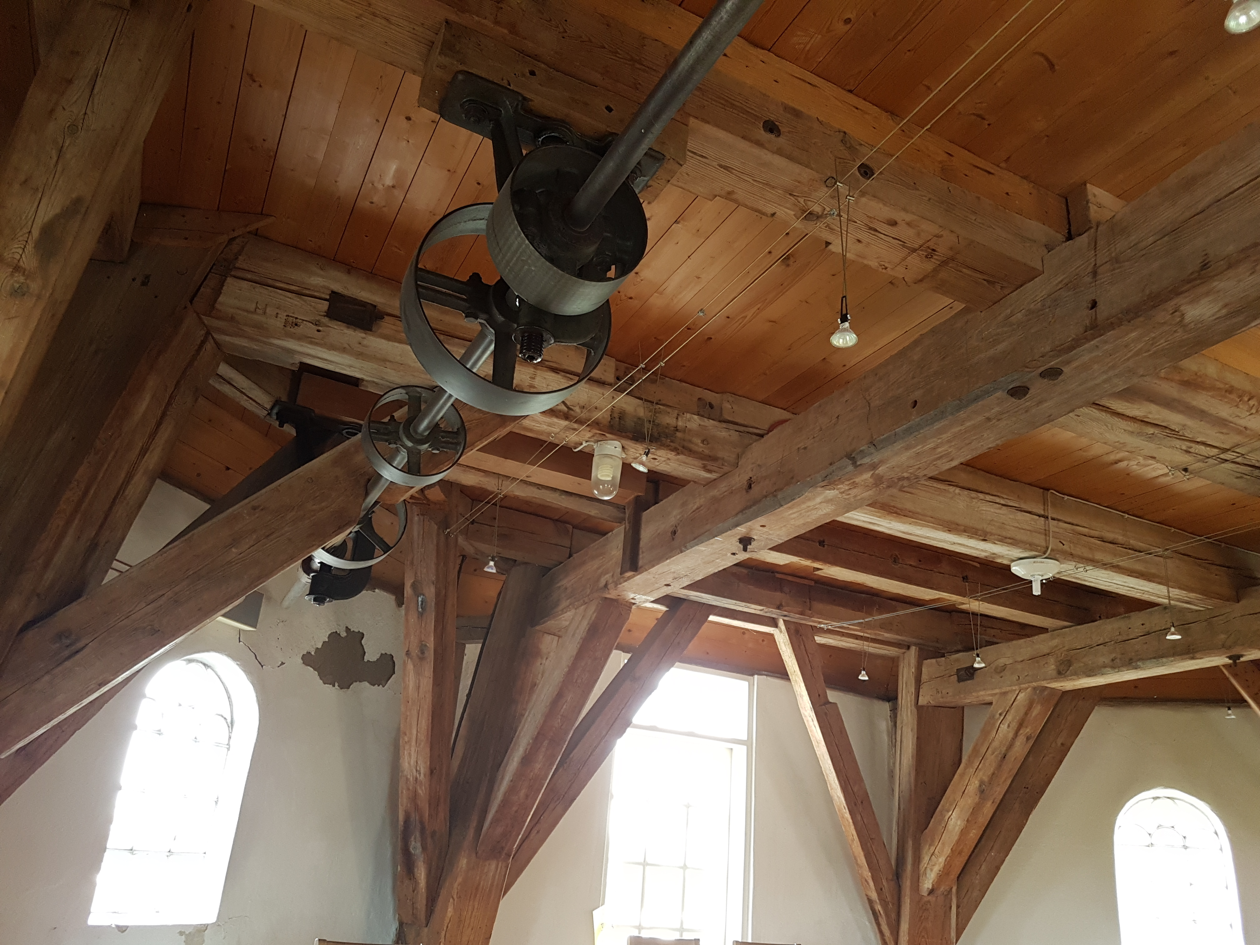 Alte Antriebswelle der Windmühle Wehbers Mühle in Himmelpforten. Heute als Ausstellungsstück im Restaurant zu sehen.